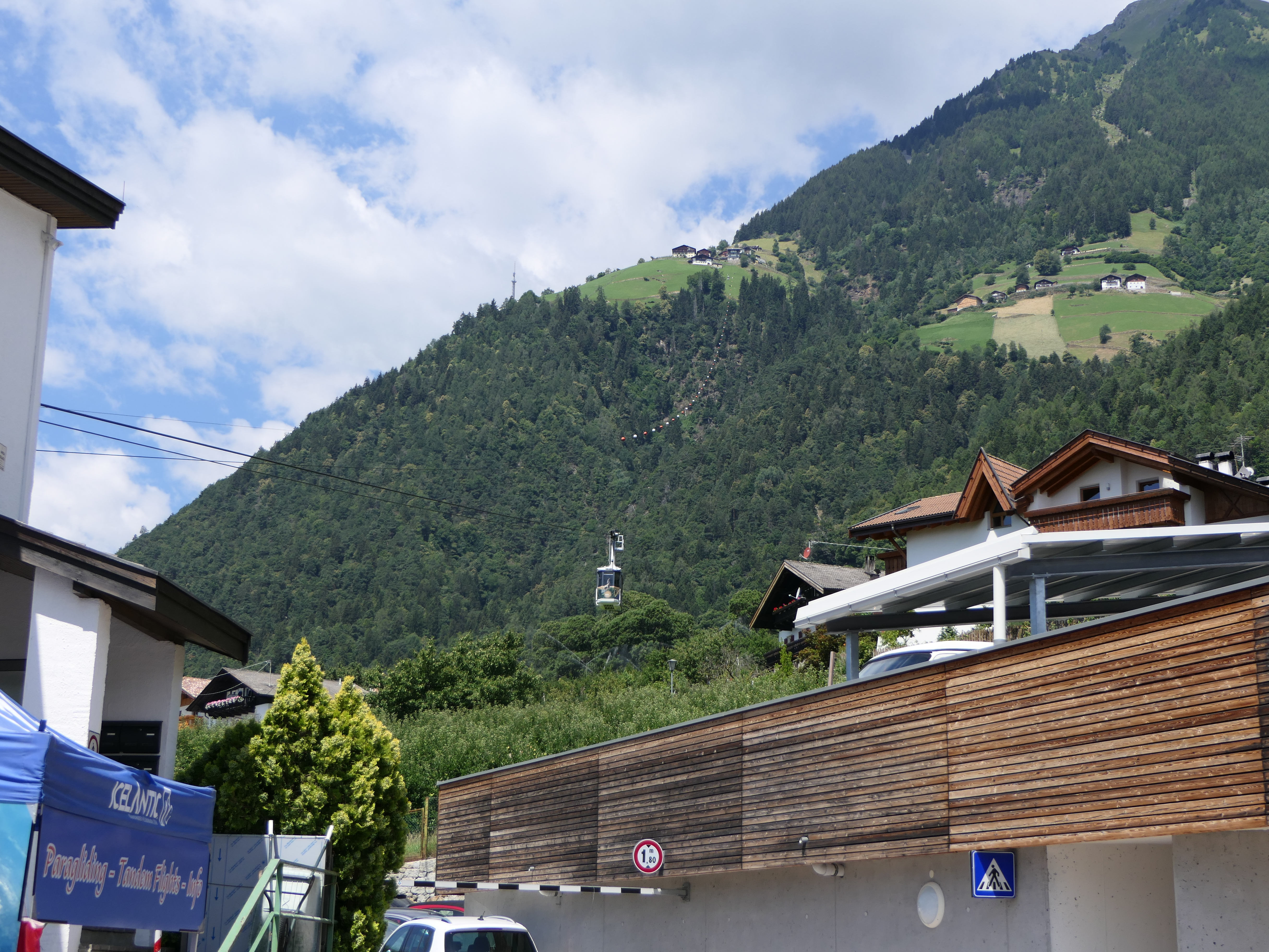 Blick von der Talstation der Hochmuterbahn, einer Luftseilbahn hinauf zum Hochmut, in Dorf Tirol (oberhalb von Meran in Südtirol), hinauf zur Bergstation auf dem Hochmut.